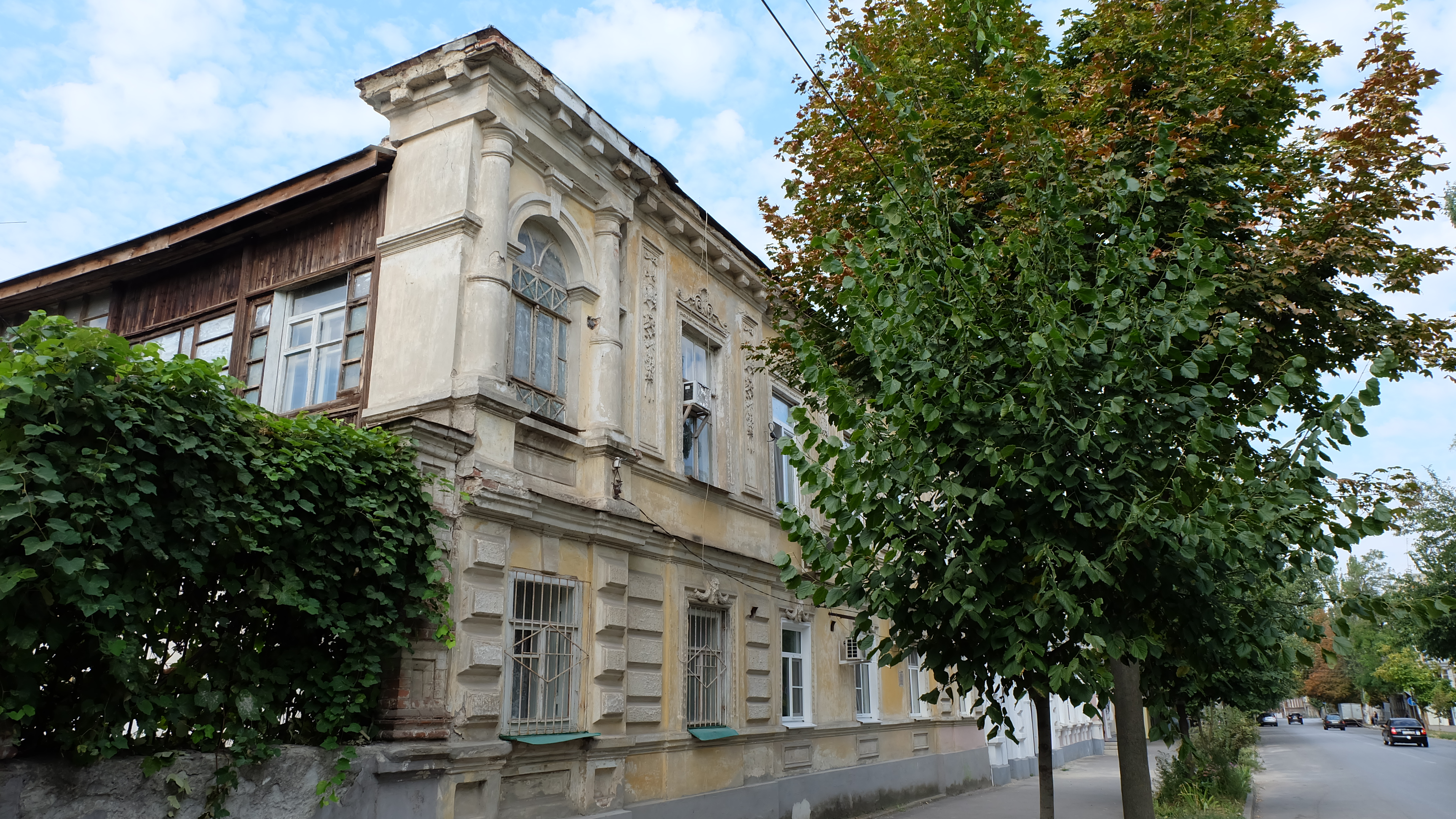 Жилой дом, комплекс застройки улицы: улица Греческая, 47, Таганрог, Ростовская область